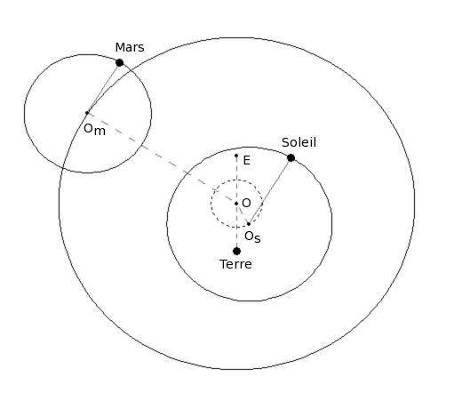 Description : Trajectoire de Mars d'après le système géocentrique de Ptolémée. Source : Dhenry ; schéma personnel. Licence